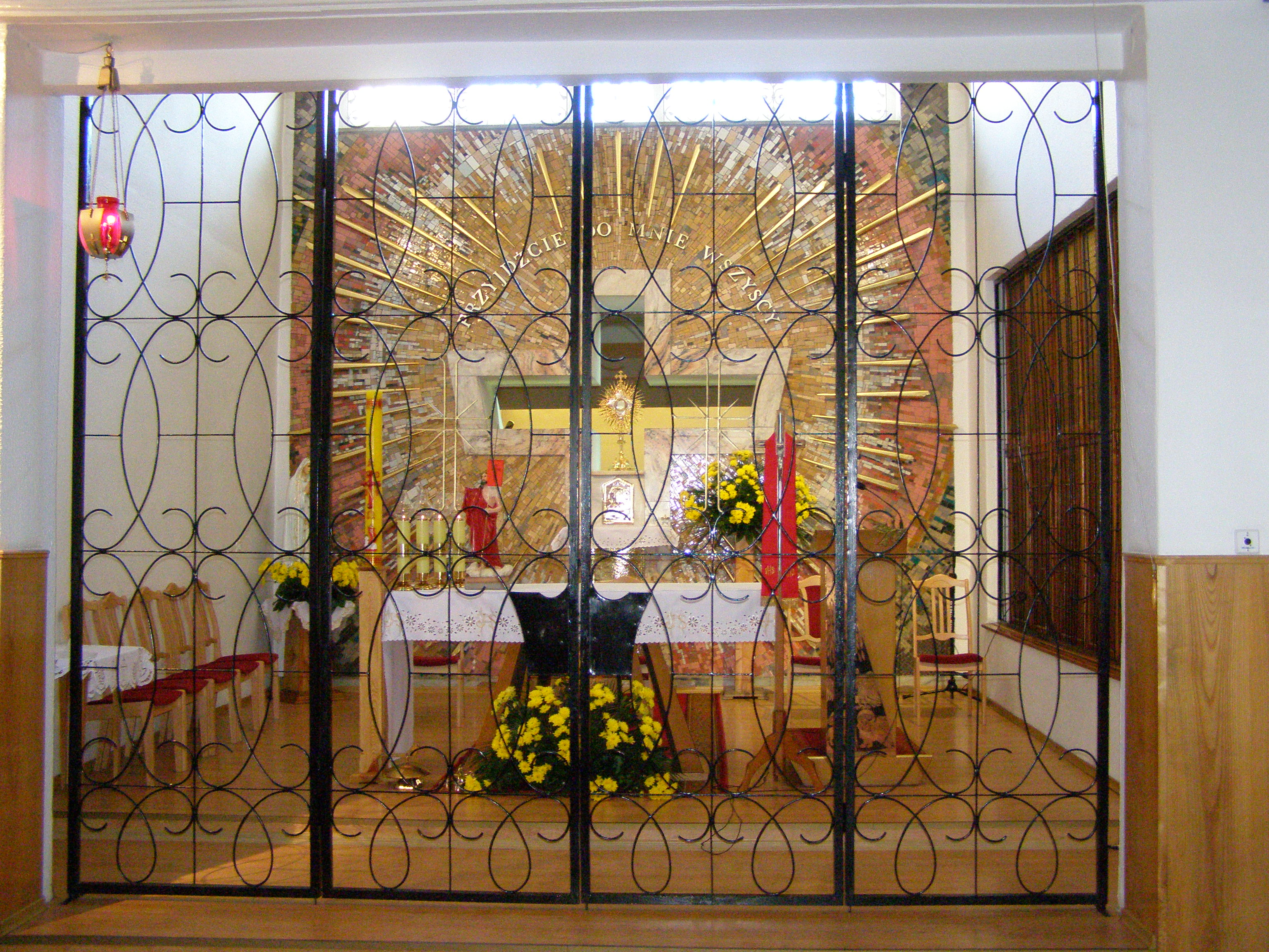 Wnętrze kaplicy klarysek w Bydoszczy